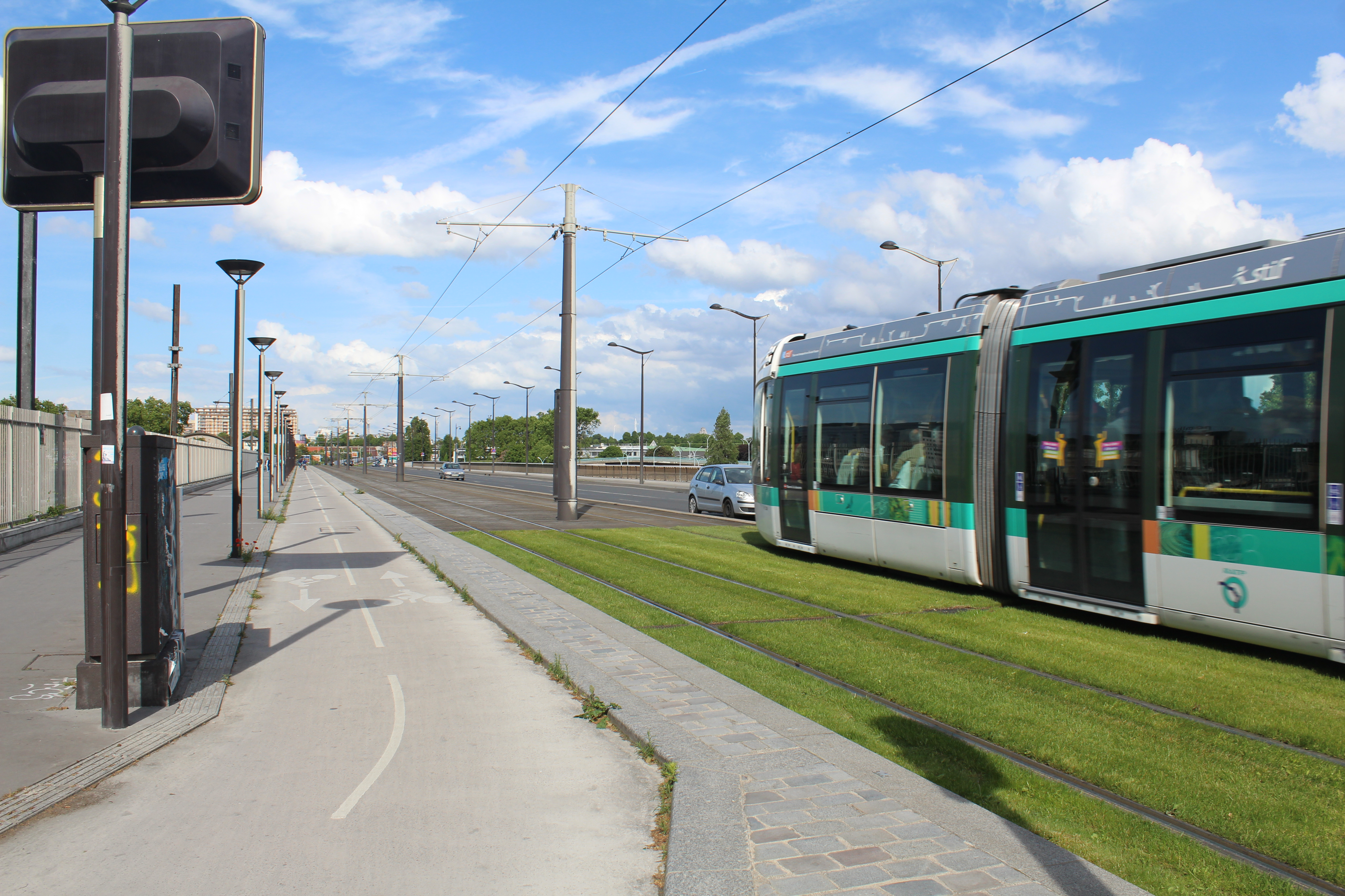 Ligne 3a du tramway d'Île-de-France au pont National, Paris.